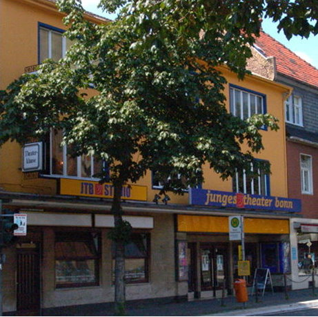 Junges Theater Bonn, Außenansicht